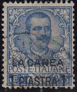 Почтовая марка Итальянской почты на острове Крит